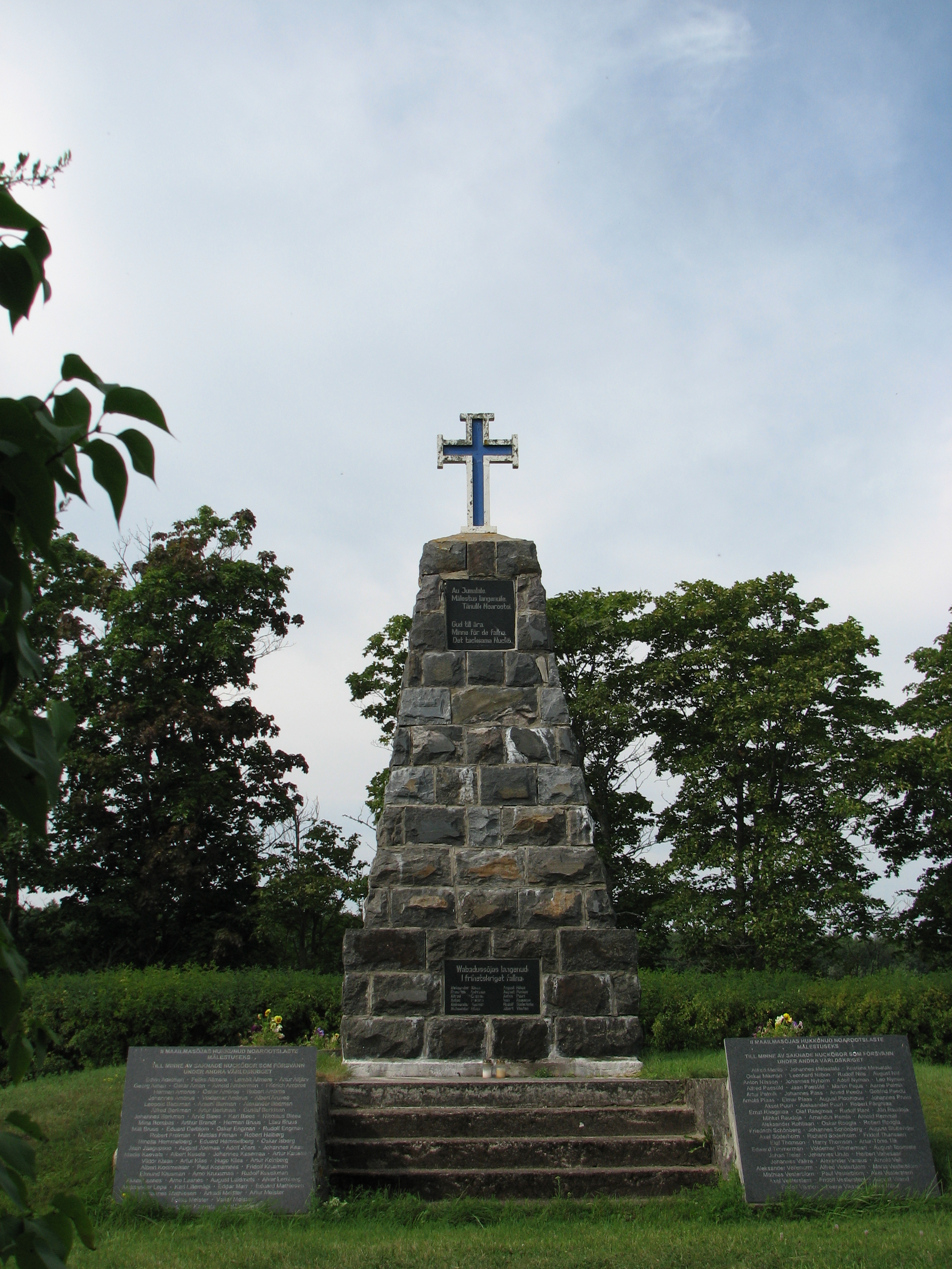 Noarootsi Vabadussõja mälestussammas surnuaias (Hosby külas).